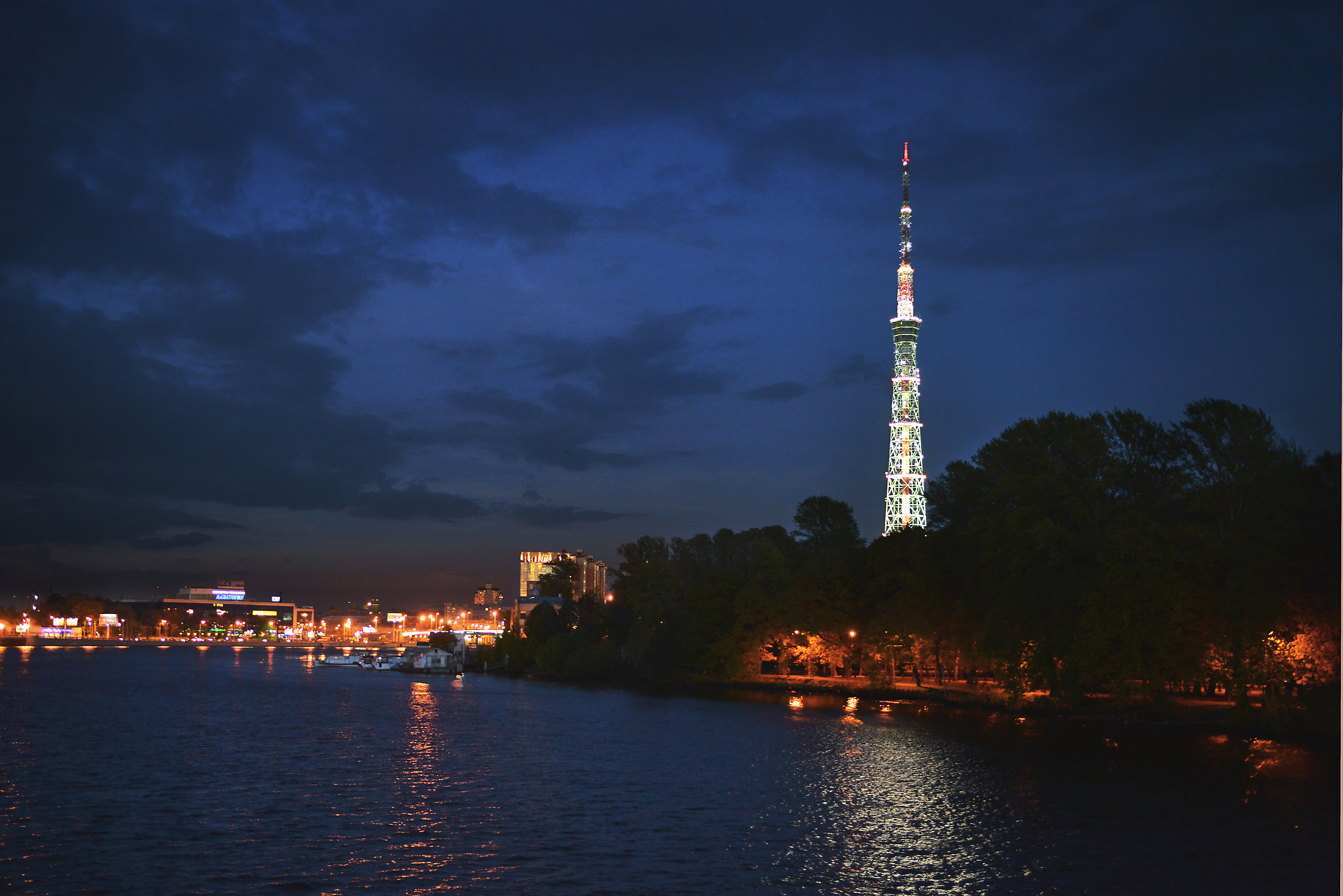 Телевизио́нная ба́шня Ленингра́дского радиотелевизио́нного передаю́щего це́нтра